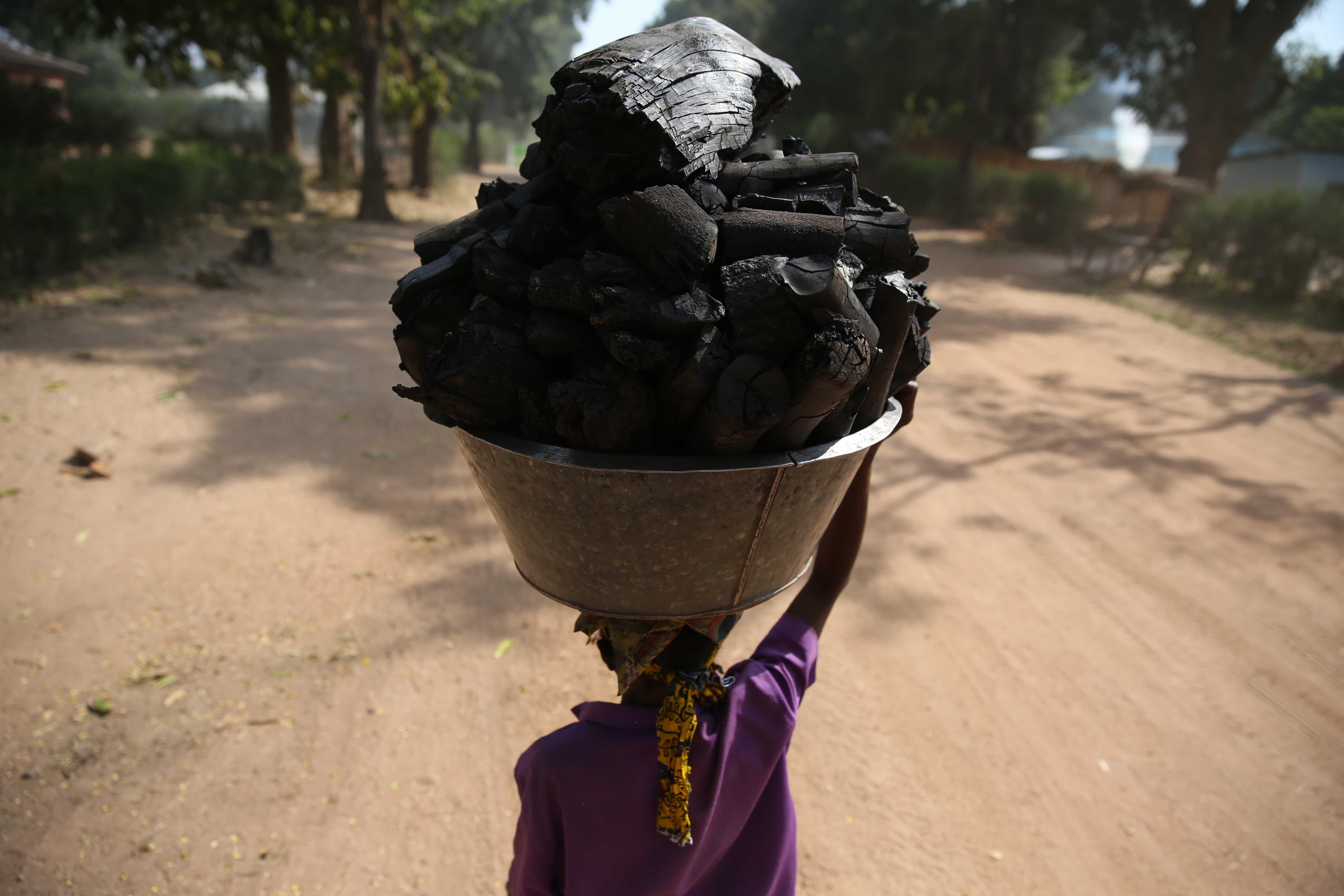 Le charbon de bois est l'une des principales sources d'énergie au Congo.